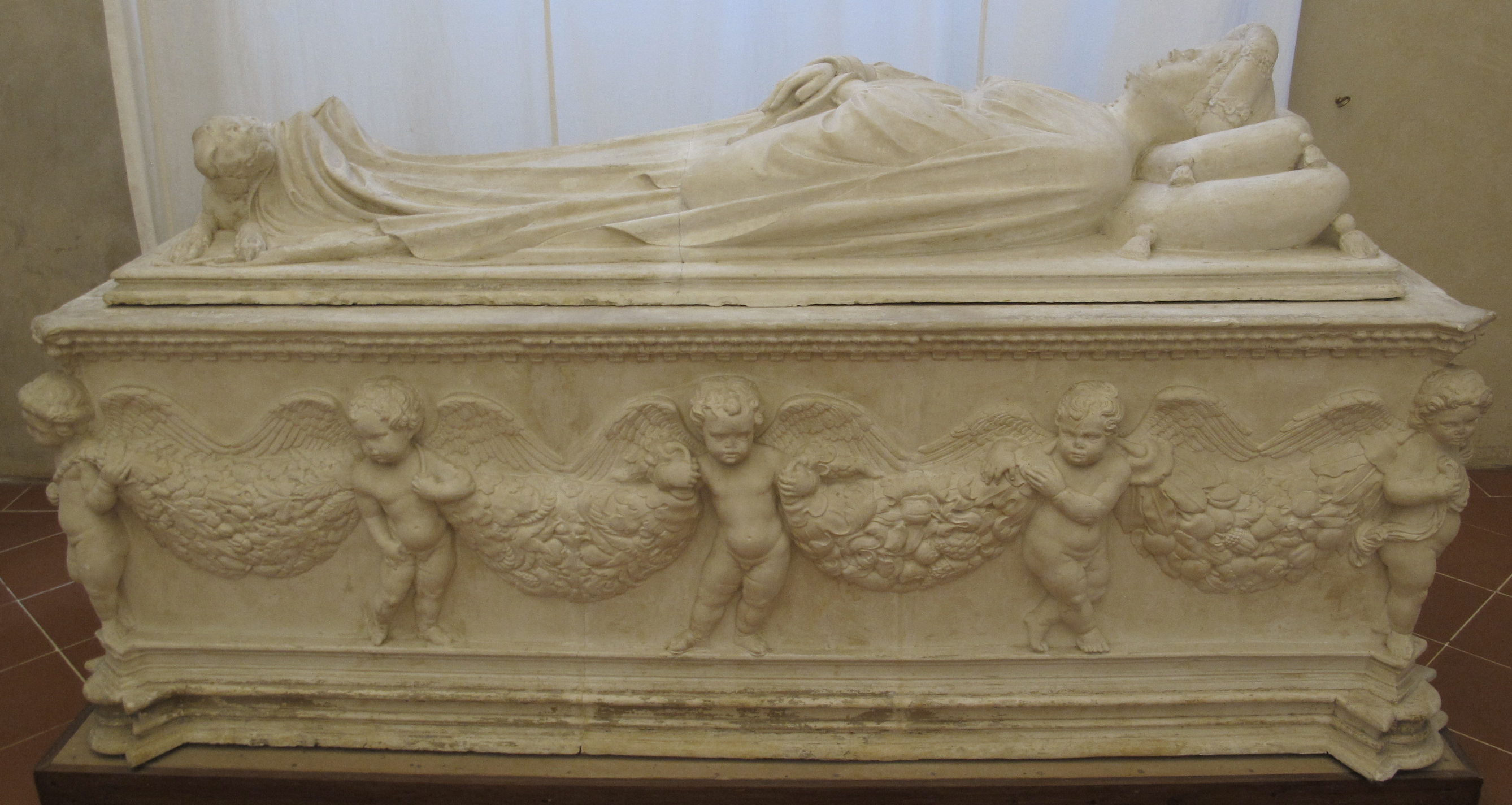 The tomb of Ilaria del Carretto (c. 1406)